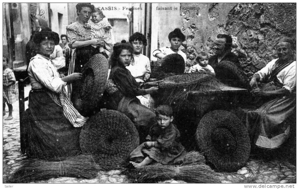 Femmes tressant des scourtins à Cassis